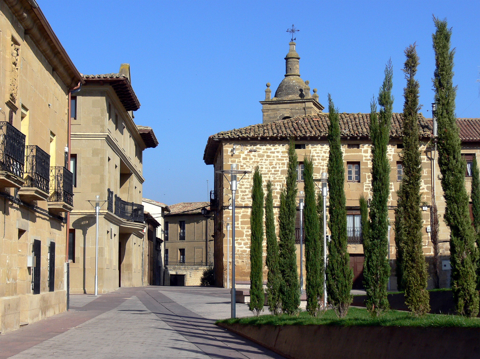 Tirgo, municipio de La Rioja (España)